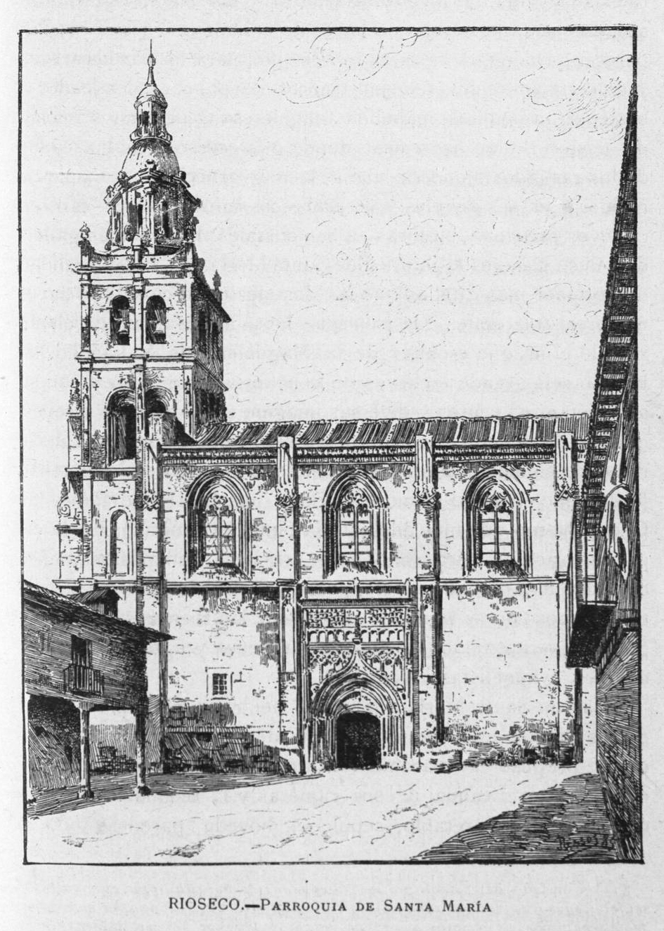 Rioseco. Parroquia de Santa María.